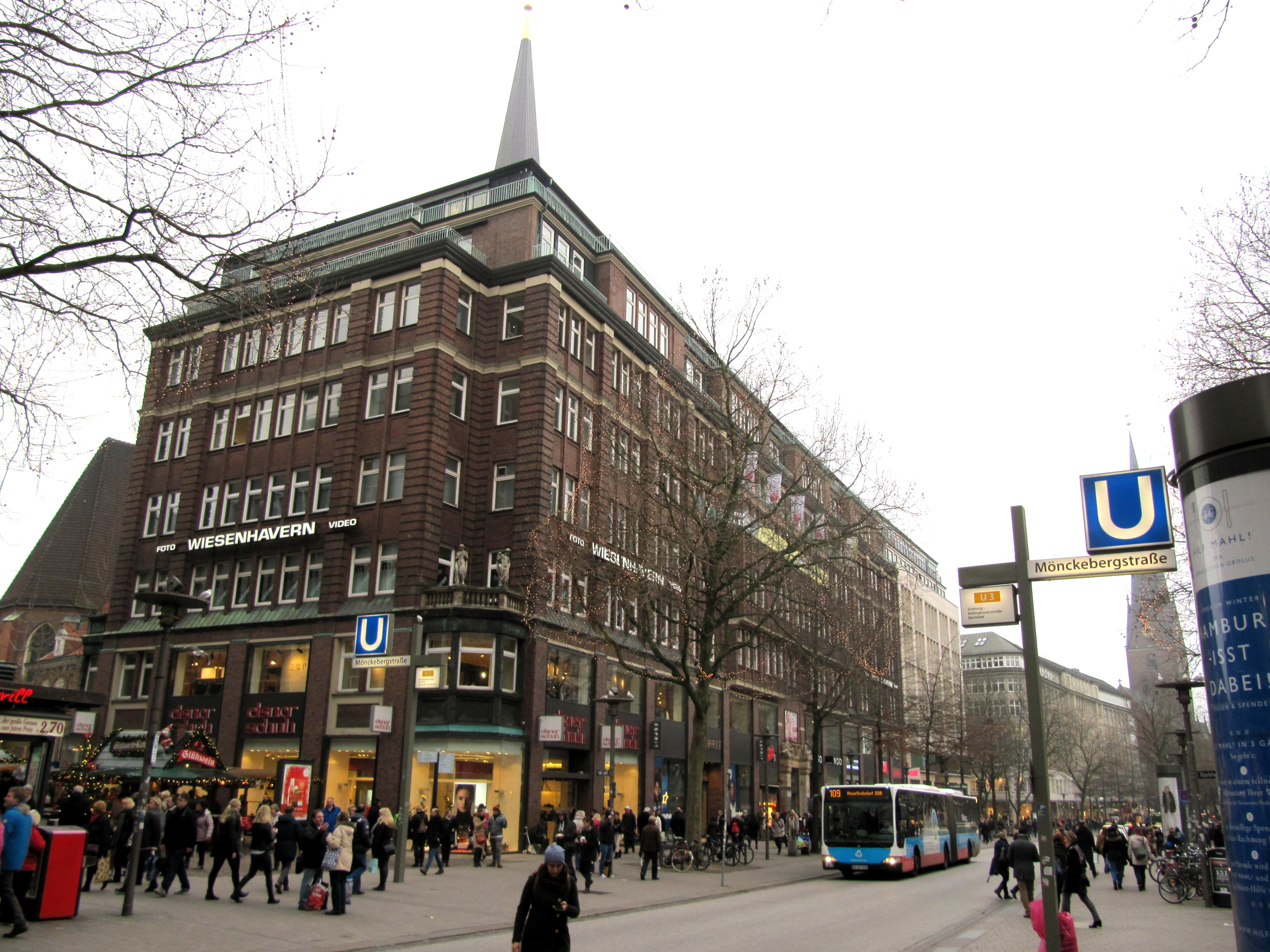 Rappolt-Haus, Mönckebergstraße 11, Hamburg (Dezember 2015), Architekten Höger, Fritz; Langmaack, Gerhard; Wrba, Georg; 1912; 1946 - 1954; 2005 This is a photograph of an architectural monument.